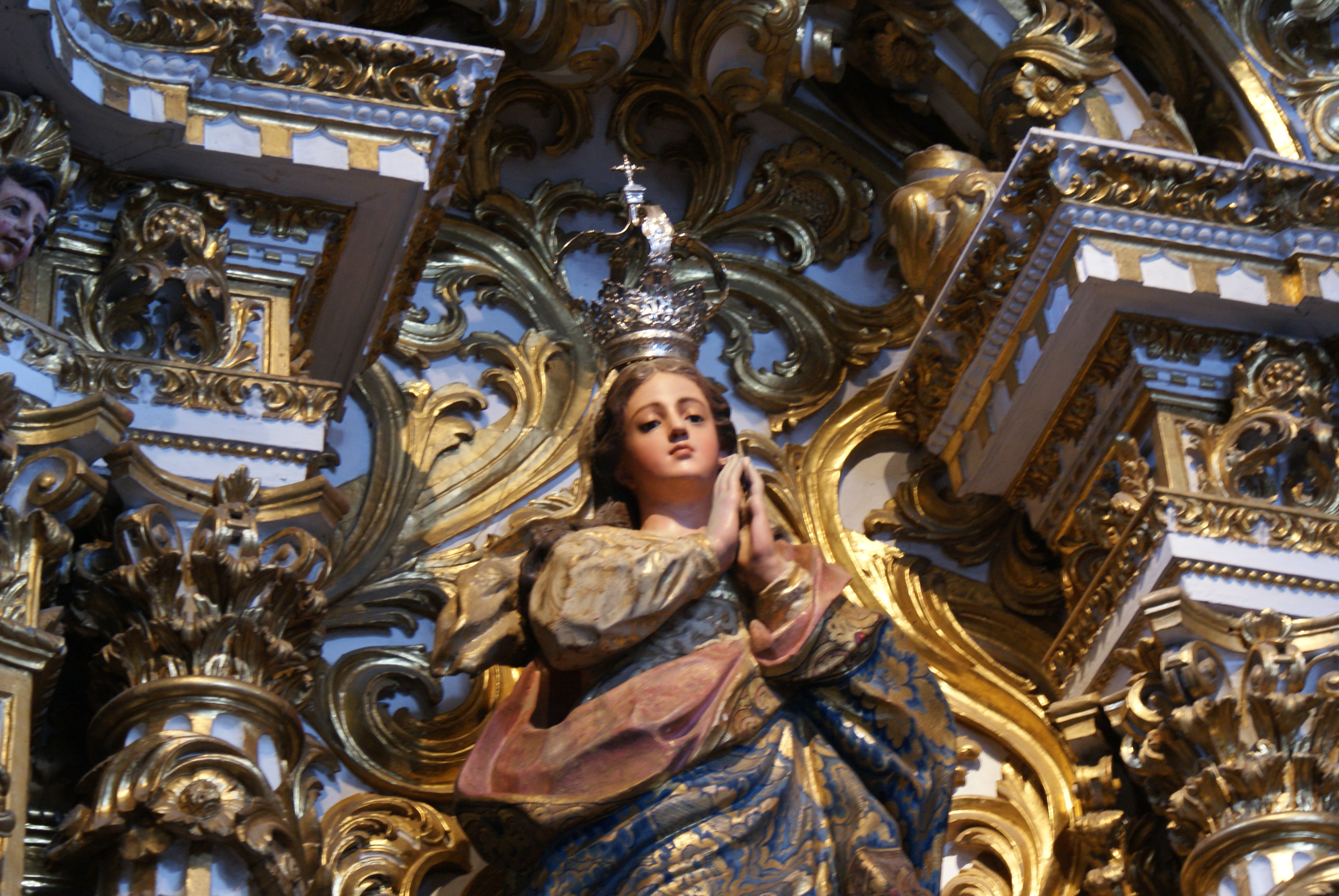 Trip to Salvador & Praia do Forte, Bahia, Brazil